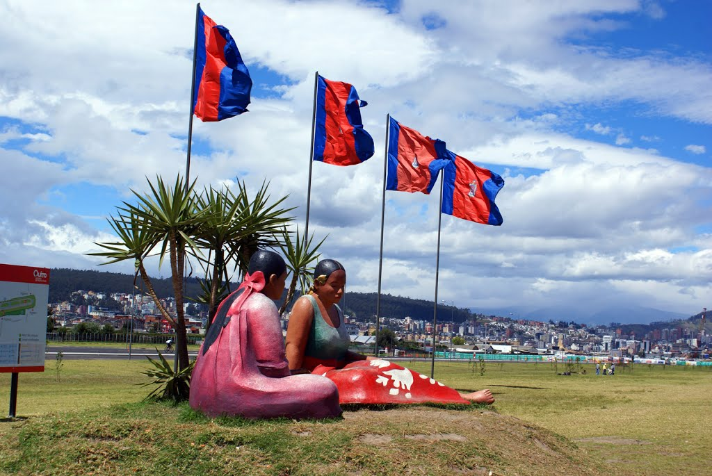 Escultura Las Tahitianas, de Marcia Vásconez Roldán. Ubicadas en el parque Bicentenario de Quito (2016).